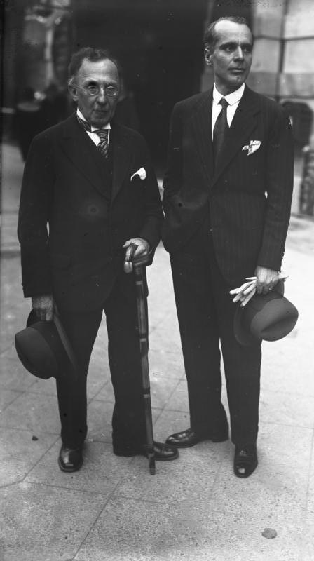 Der Führer des Luftschiffes "Italia", der italienische General Umberto Nobile besucht seit der Katastrophe am Nordpol zum ersten Mal die Reichshauptstadt. General Nobile will sich über weitere Forschungen in der Arktis mit dem deutschen Forscher und Wissenschaftler Prof. Berson unterhalten. General Umberto Nobile (rechts) und der brühmte deutsche Forscher und Wissenschaftler Prof. Berson (links) Unter den Linden in Berlin.